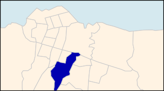 Lemba, commune de Kinshasa.